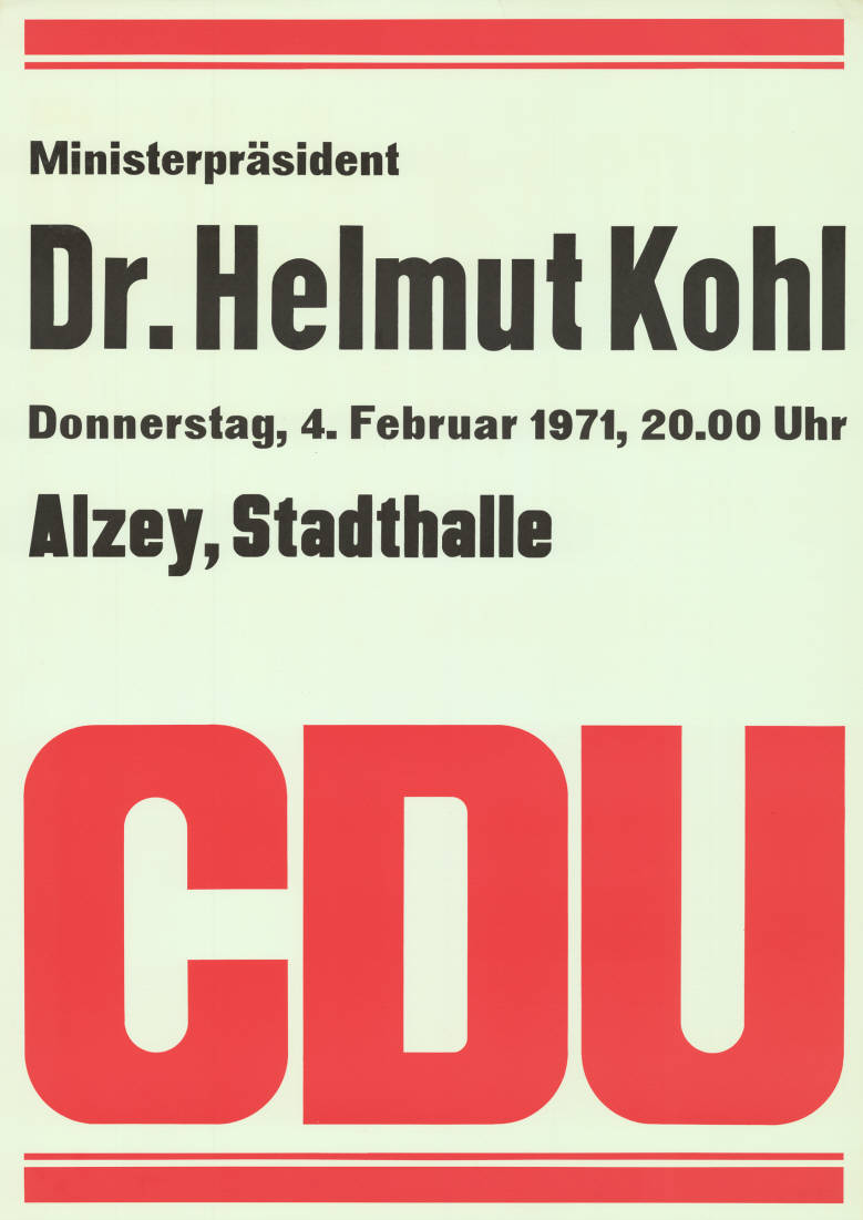 Ministerpräsident Dr. Helmut Kohl ... CDU Plakatart: Ankündigungsplakat Objekt-Signatur: 10-010 : 324/25 Bestand: Landtagswahlplakate Rheinland-Pfalz (10-010) GliederungBestand10-18: Landtagswahlplakate Rheinland-Pfalz (10-010) » CDU Lizenz: KAS/ACDP 10-010 : 324/25 CC-BY-SA 3.0 DE